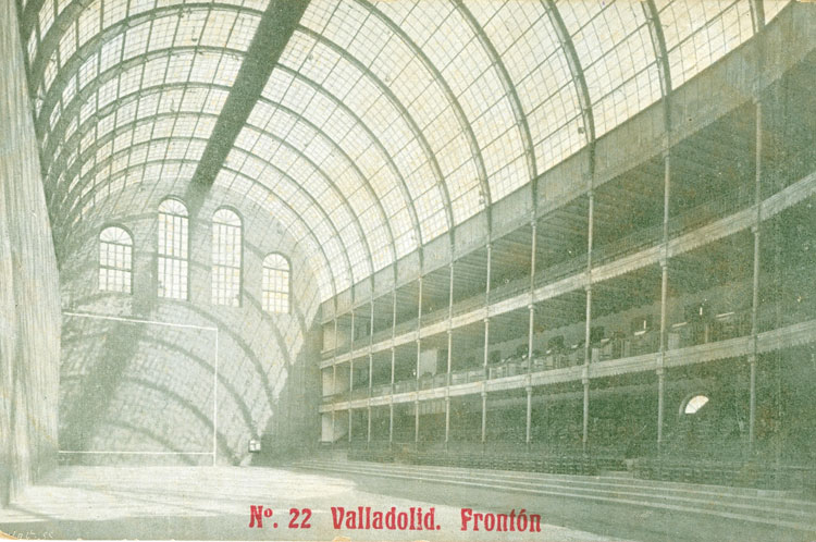 Frontón Fiesta Alegre - Valladolid - Postal Color